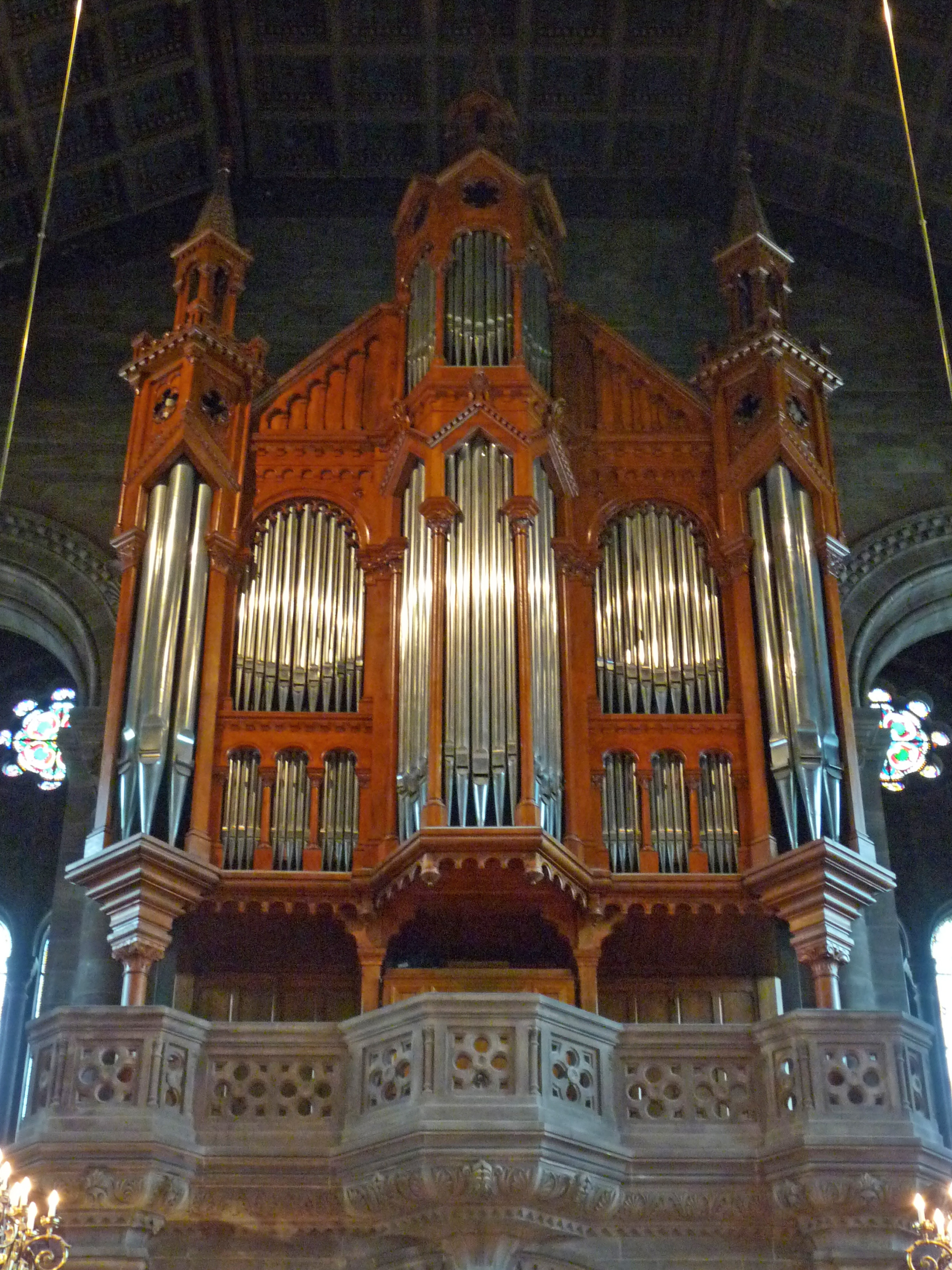 Strasbourg, Temple Neuf : orgue Joseph Merklin ( 1877 ). Voir aussi